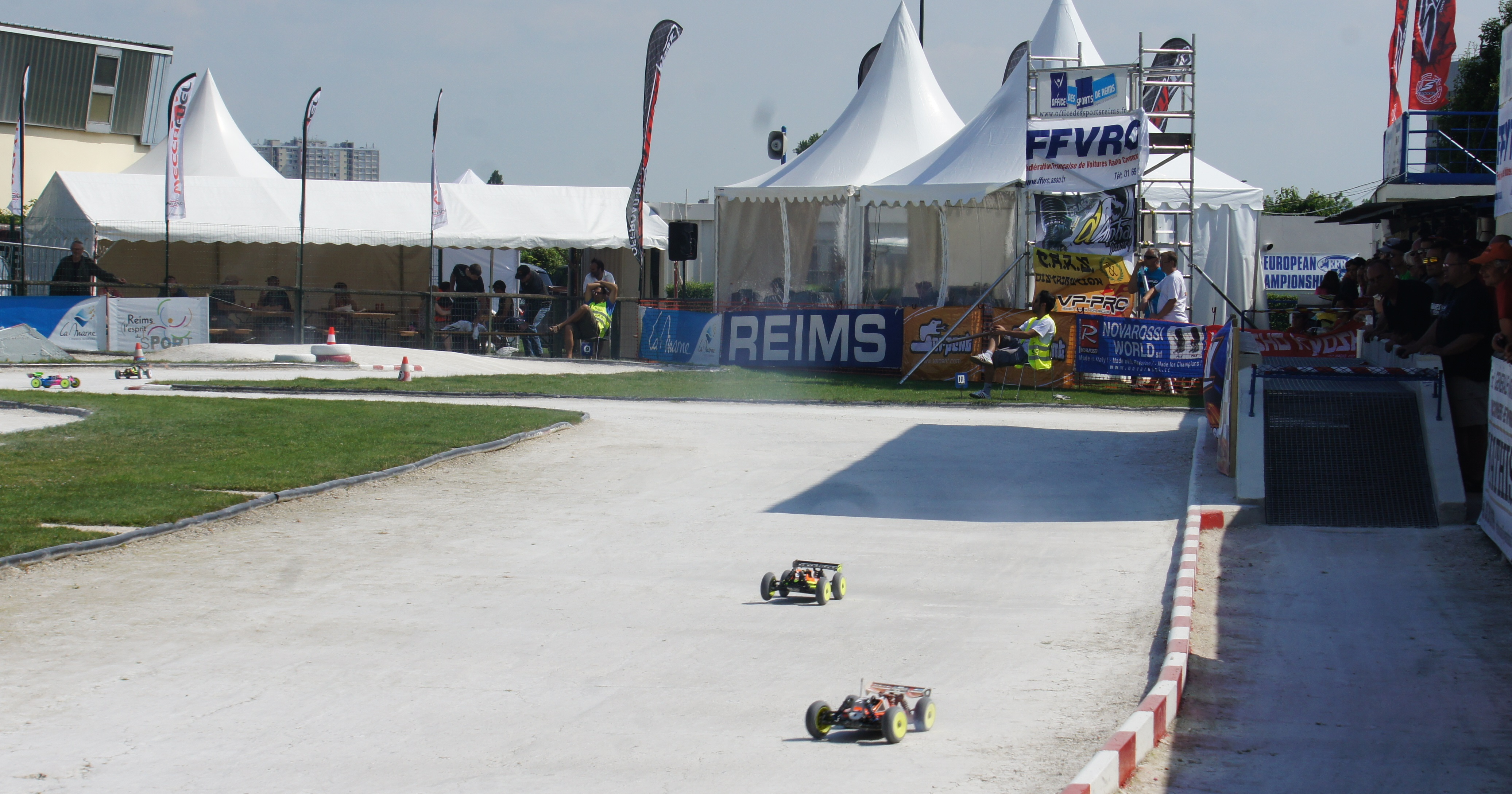 Lors du Championnat d'Europe EFRA de 2013 à Reims.